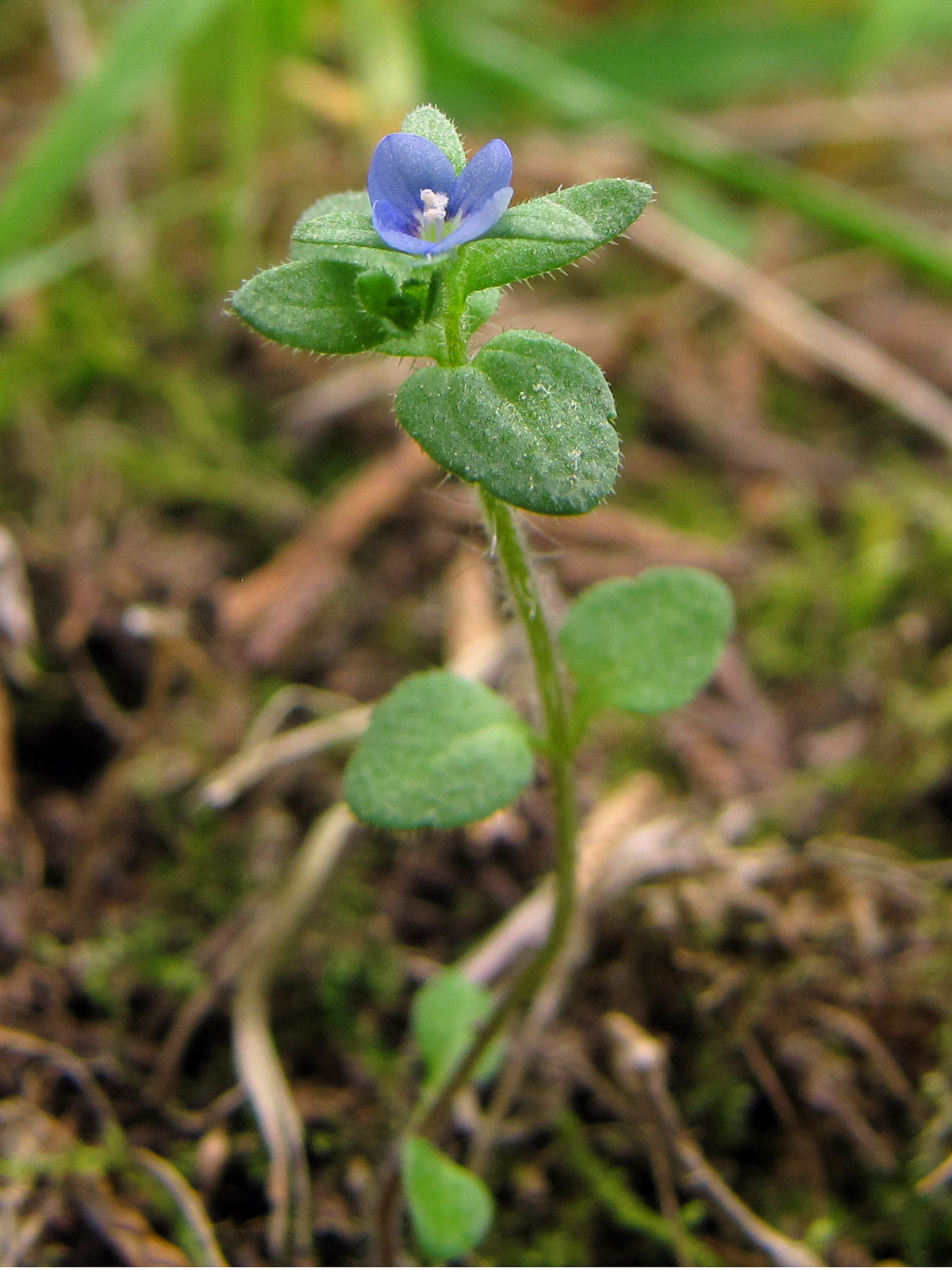 Veronica arvensis. Craigsville, Virgina, USA. 2 May 2010.